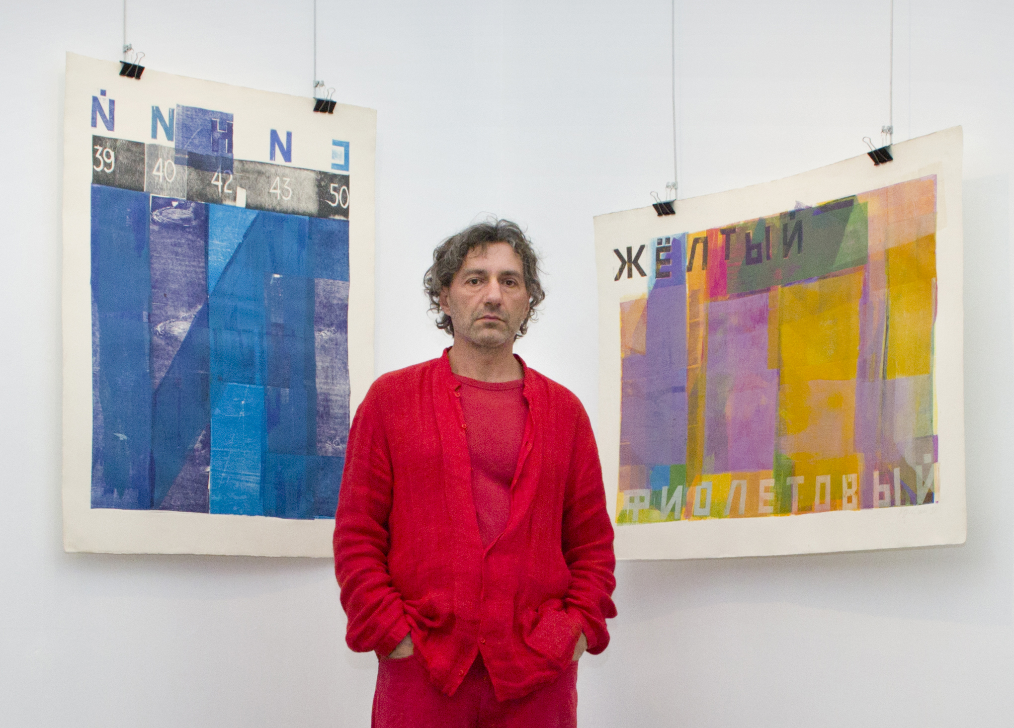 Российский художник Алексей Орловский